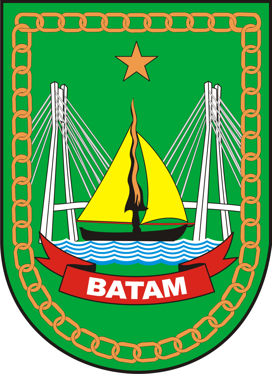 Lambang Kota Batam